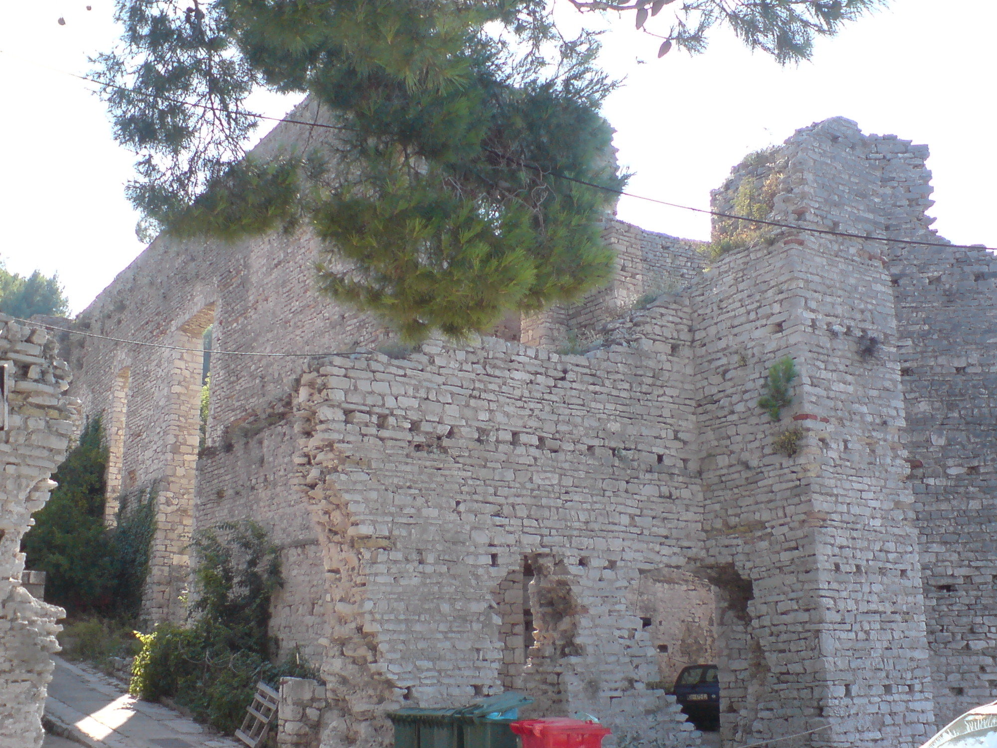 Polače ruins, Mljet, Croatia